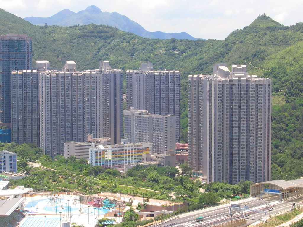 景林邨 King Lam Estate